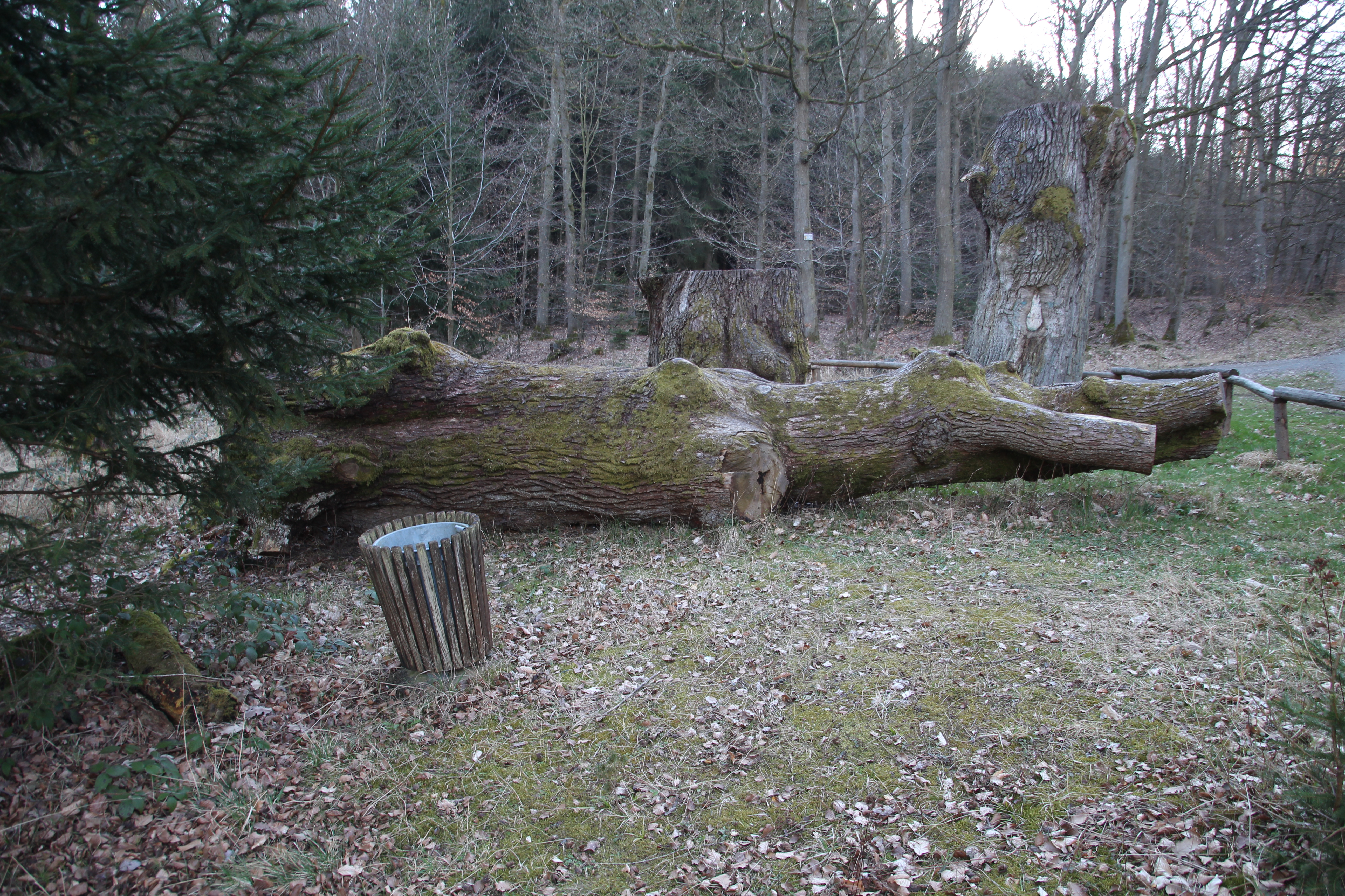 Siehe Bild und Dateiname